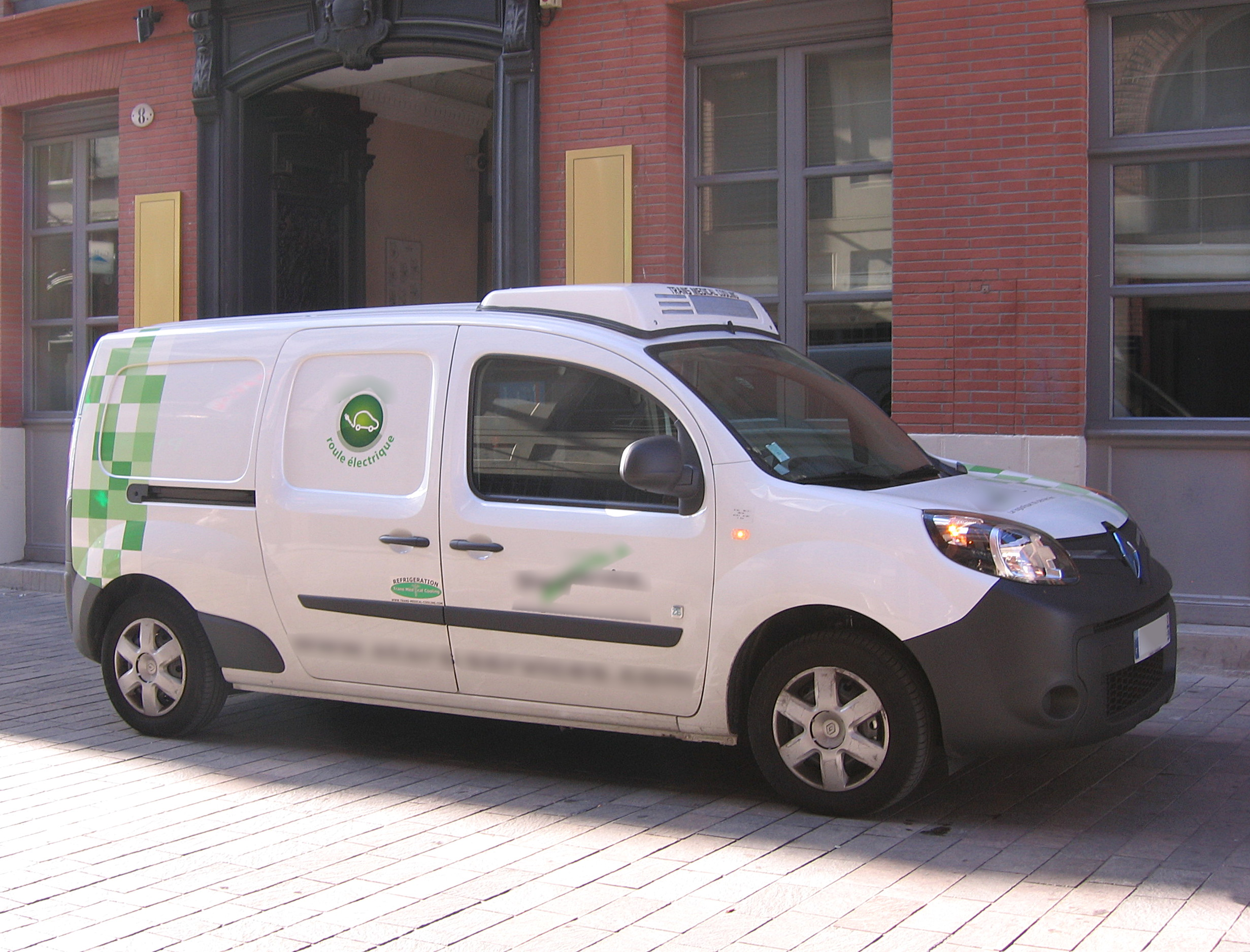 2013 Renault Kangoo Maxi ZE.